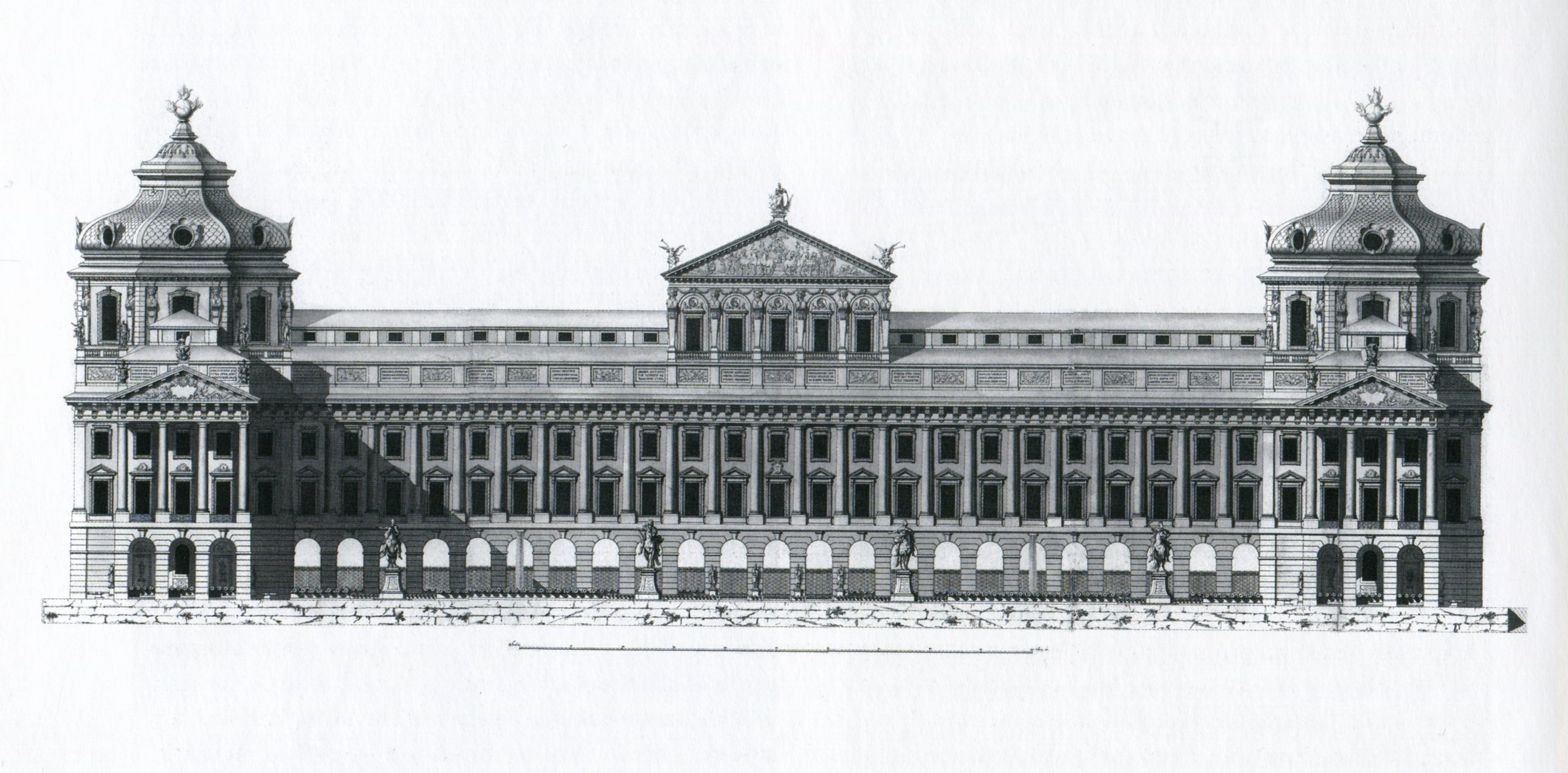 Förslag till segerhall och troféplats i Stockholm, fasad mot Strömmen